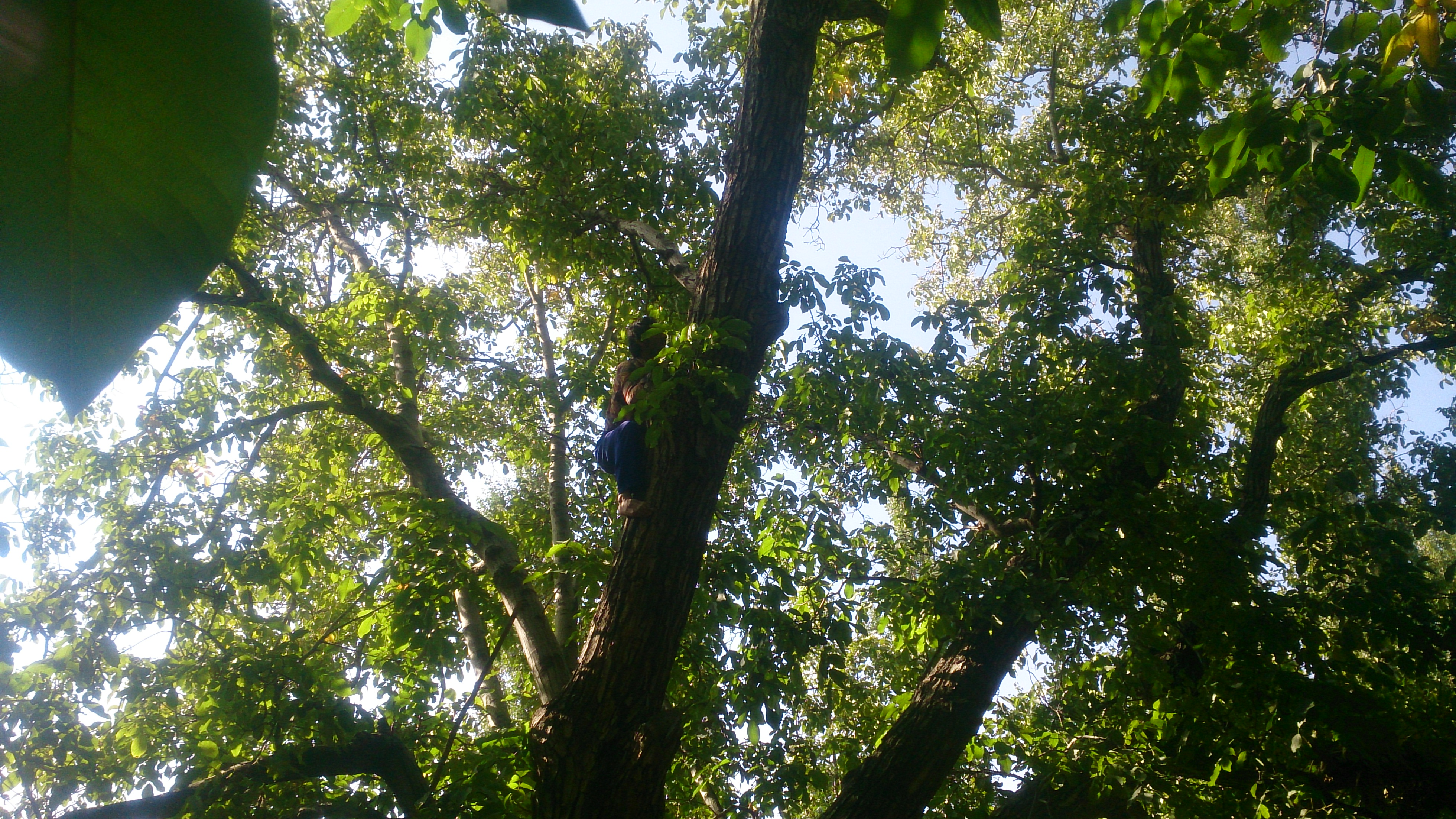 برداشت گردو (گردو تکانی) در روستای دامنه